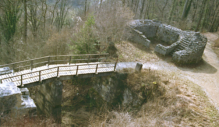 Vorwerk und Bruecke der Farnsburg